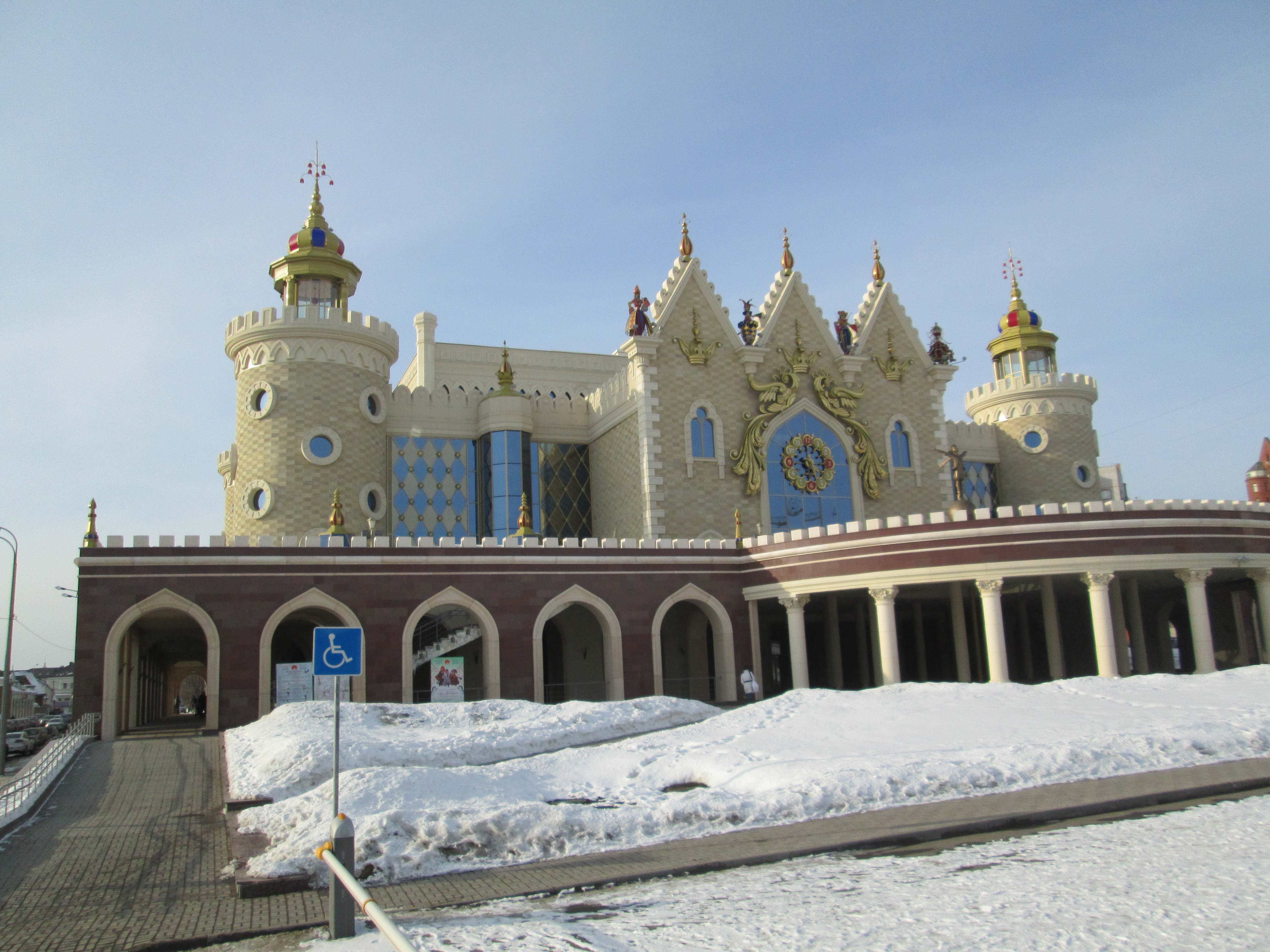 Татарский государственный театр кукол «Экият» в Казани. вид с петербургской улицы